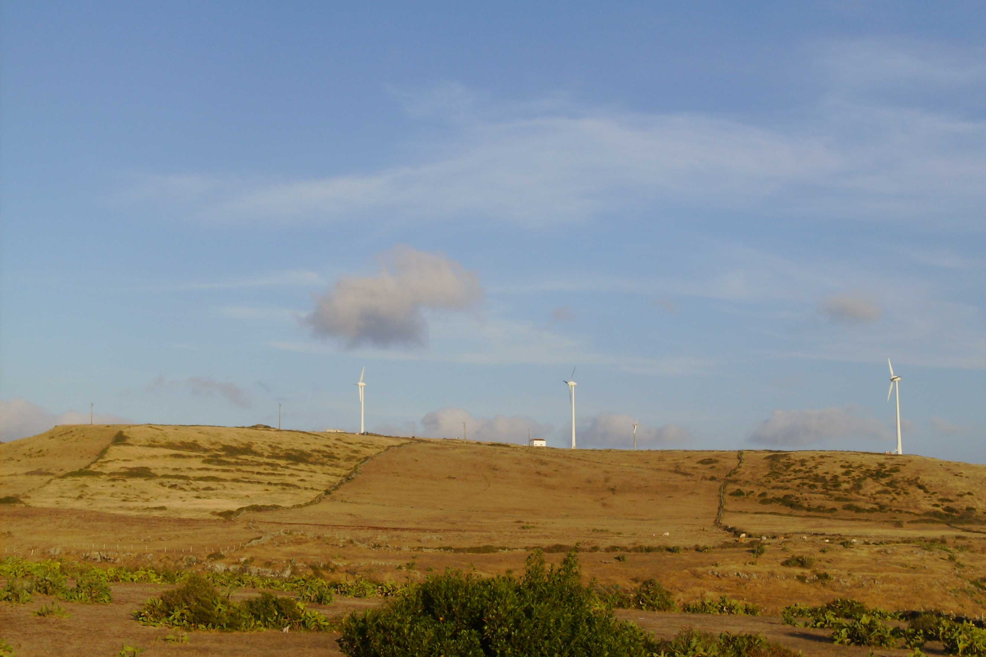 Parque Eólico do Figueiral, freguesia de Vila do Porto, Concelho de Vila do Porto, ilha de Santa Maria, Açores.